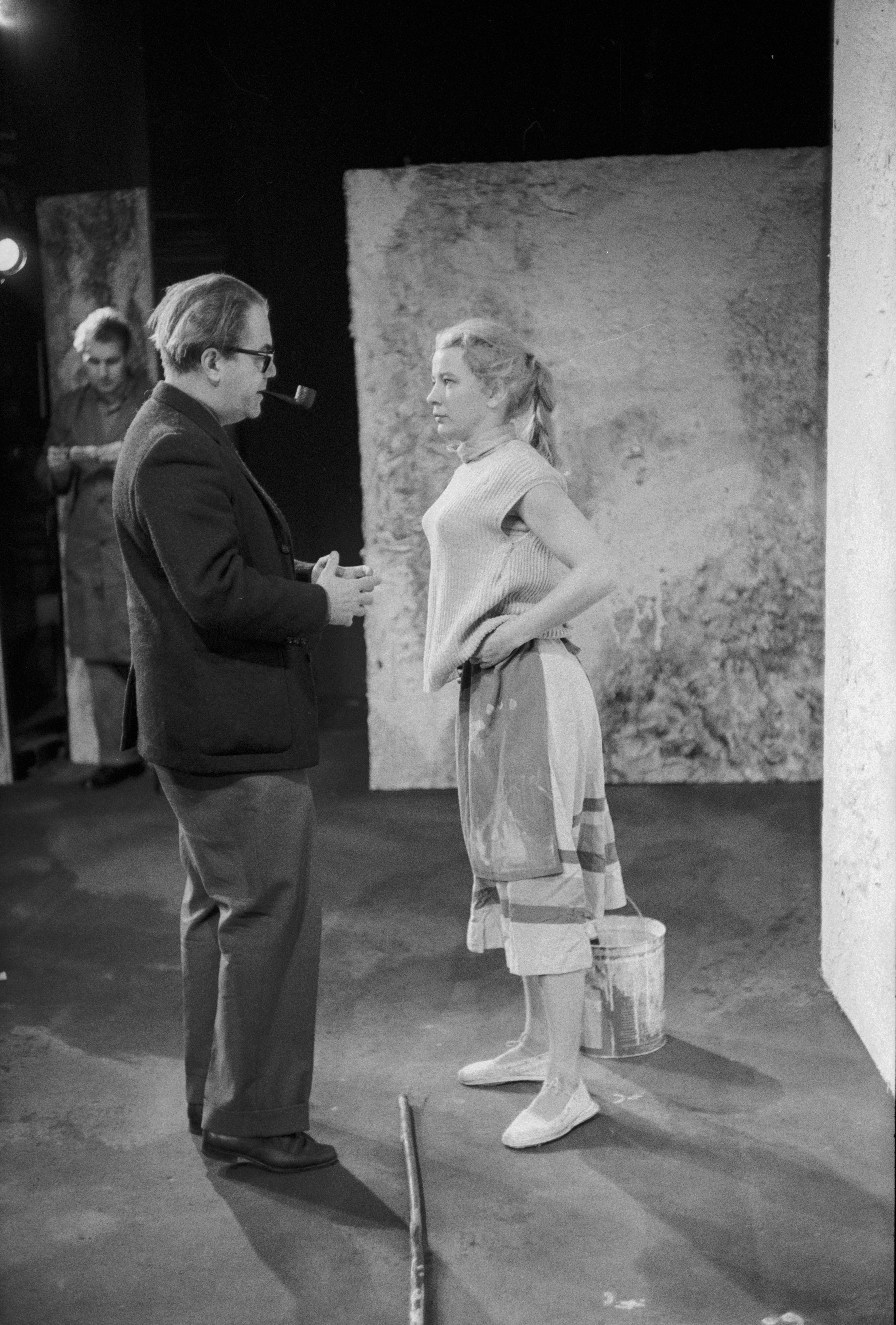 Regie: Direktor Hirschfeld